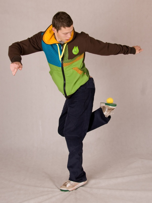 Tomáš Tuček při hře v ateliéru